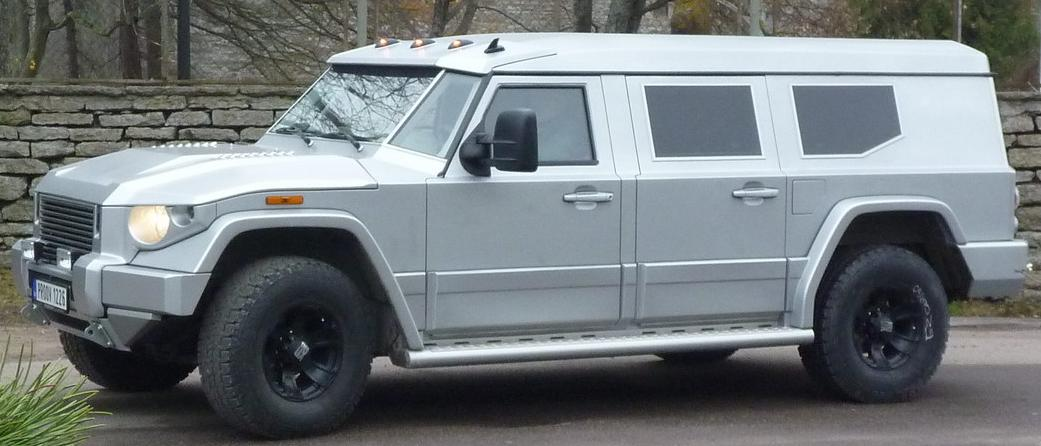 no original description